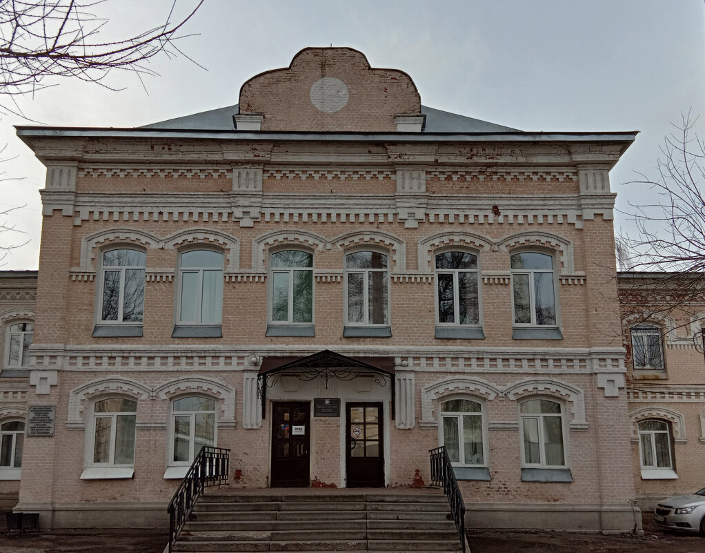 Александровская учительская семинария